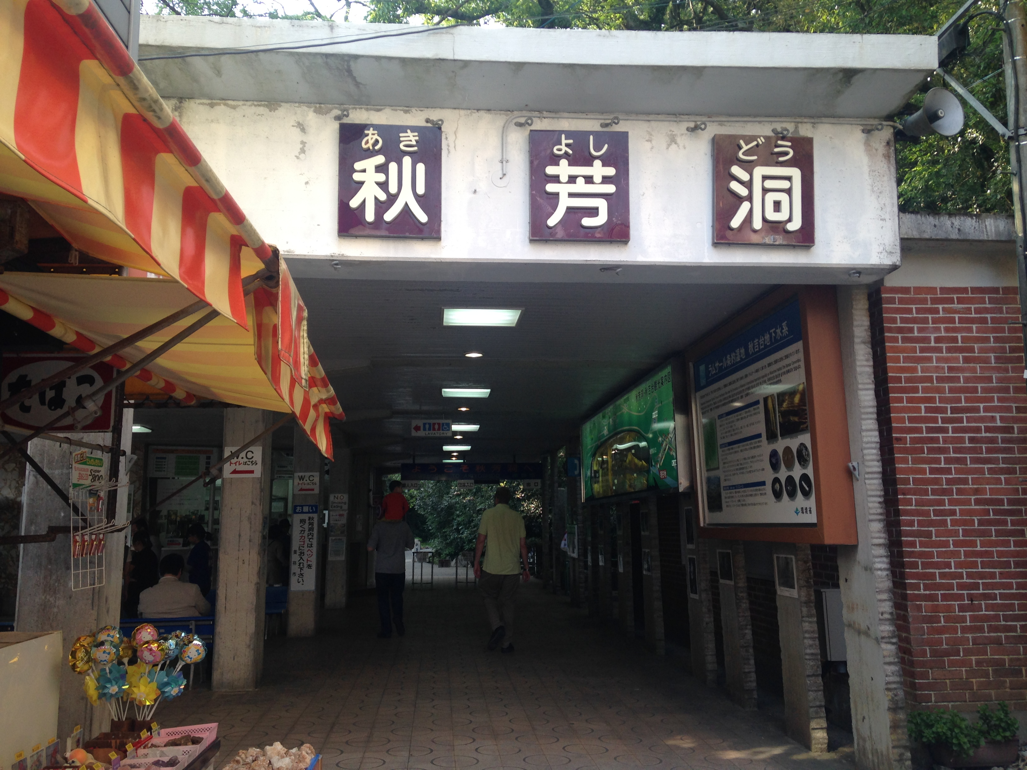 秋芳洞の入り口